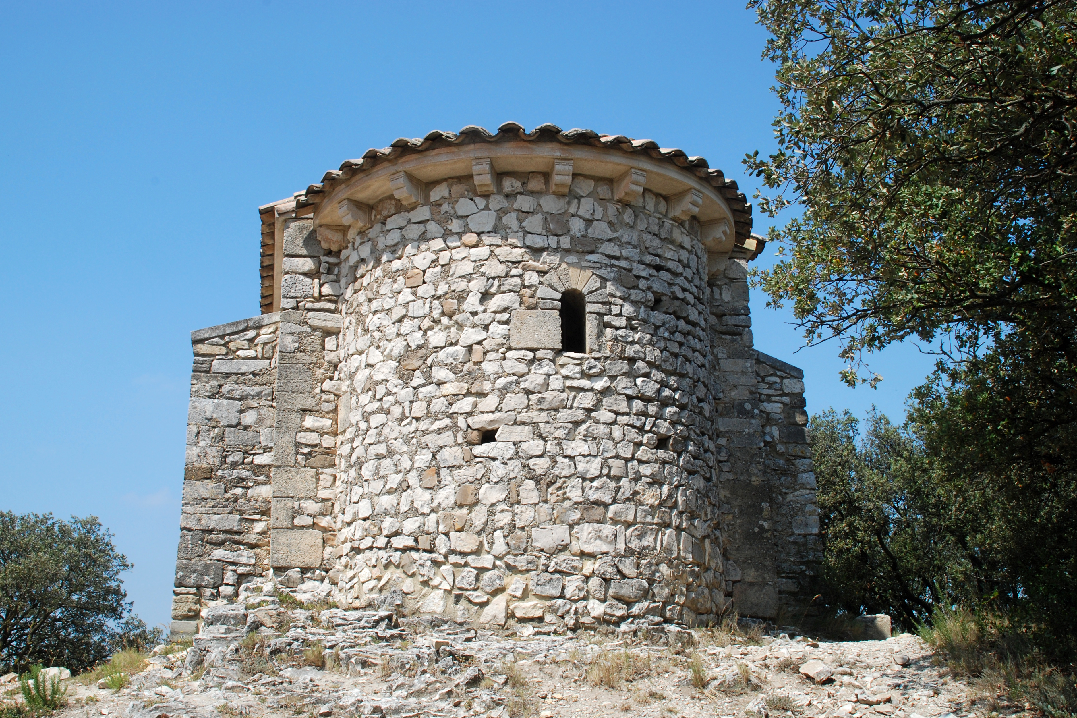 France - Provence - Vaucluse - Le Thor - Chapelle Saint-Pierre de Thouzon